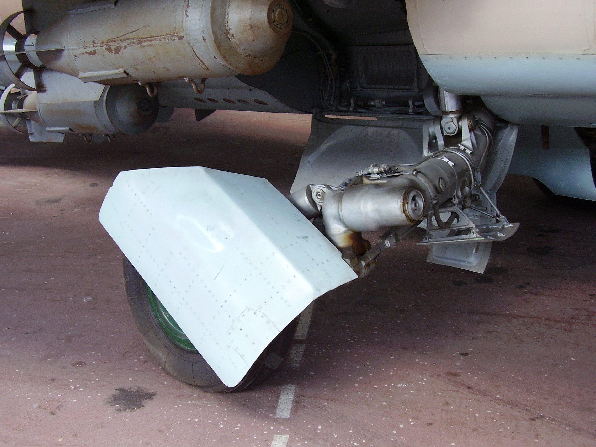 Royal Military Museum Brussels, Musée Royal de l'Armée, Koninklijk Museum van het Leger en de Krijgsgeschiedenis